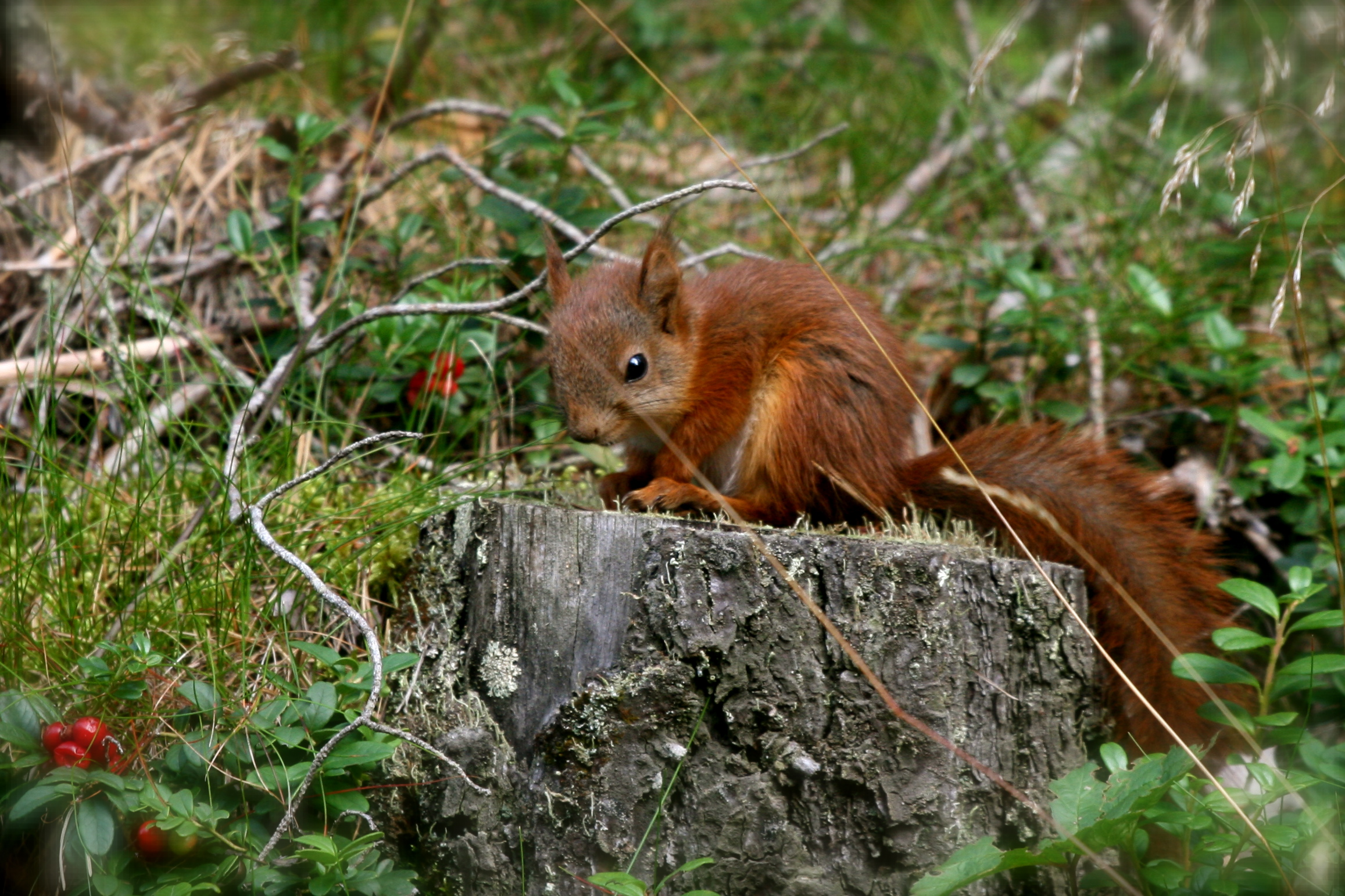 Raud ikorn